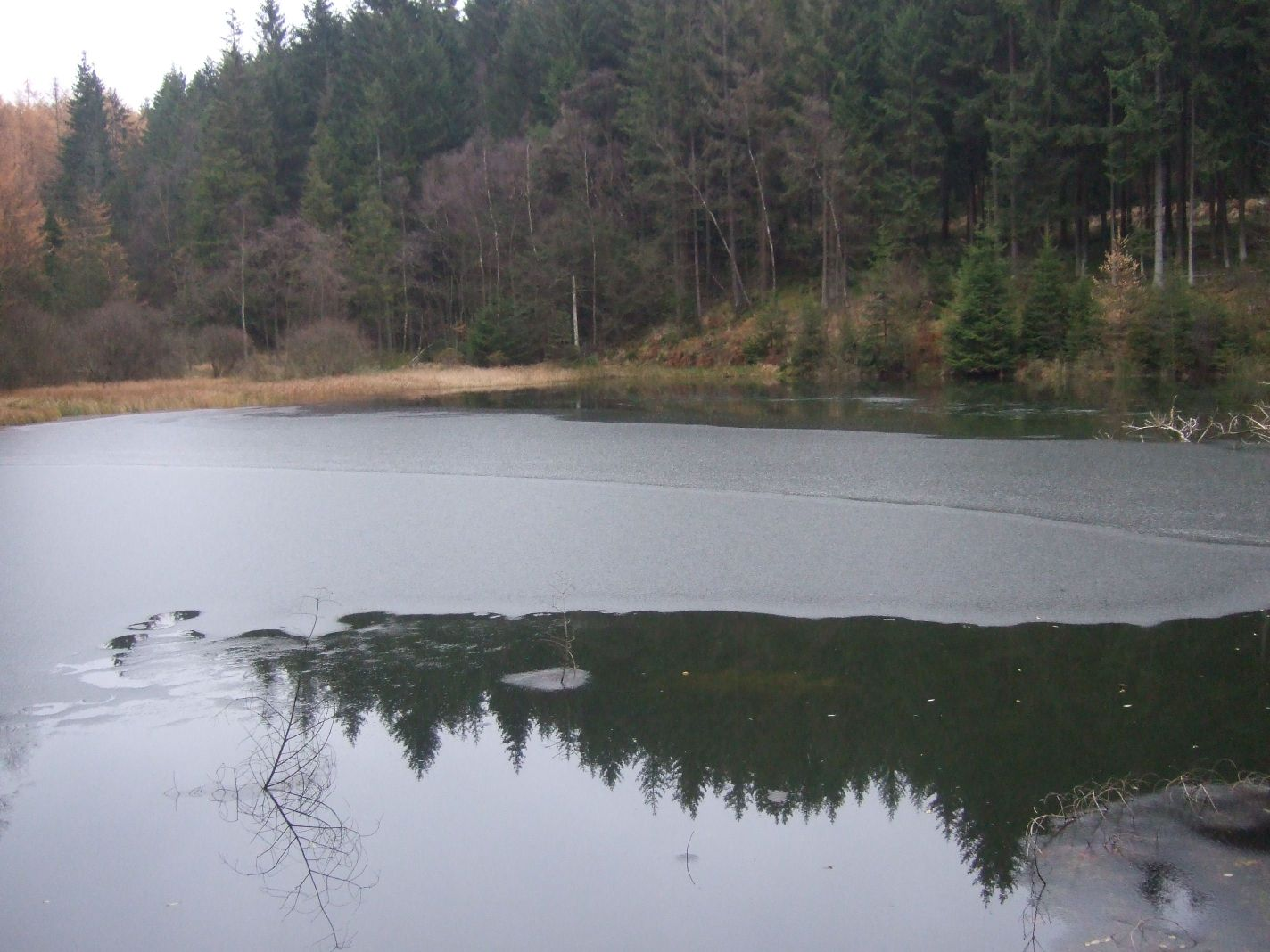 Pionierweiher am Eschbach im Osburger Hochwald